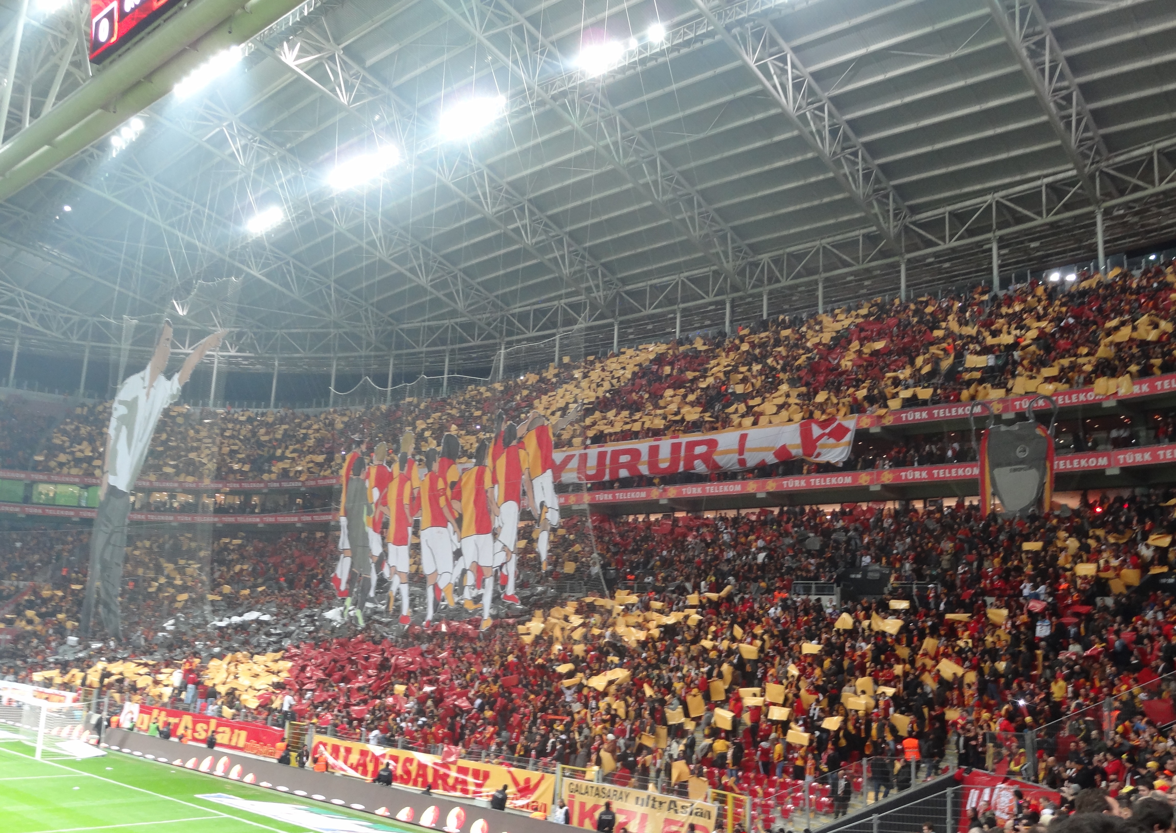 Galatasaray'ın taraftarı ultrAslan'ın yaptığı 3 boyutlu kareografi CİMBOM BAŞI DİK YÜRÜR yazmaktadır.